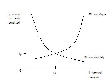 graf popisujici Coaseho teorem